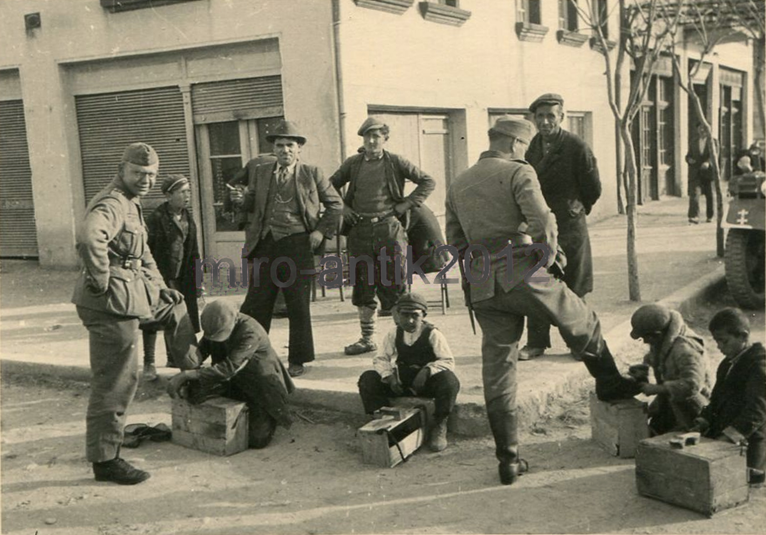 Kinder putzen Wehrmachtssoldaten die Schuhe. Aufnahme im Hungerjahr 1941 in Kavala, Griechenland. German soldiers and working children in Kavala, during the great famine in Greece, 1941